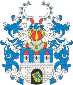 Schon die Mutterstadt Celles, Altencelle, hatte das heutige Stadtwappen in ihren wesentlichen Teilen im Jahre 1288, wobei sich die Helmzier schon mit Sicheln und Pfauenfedern direkt auf dem Löwenschild im Tor befand. Die Mauer wurde von zwei Türmen flankiert. Bereits 1579, im Wappen am Nordgiebel des Rathauses, ist die Helmzier von dem kleinen Schild im Tor auf den großen Schild gewandert und ist mit kleineren Abweichungen in dieser Form bis heute gültig.